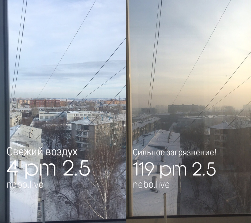 На фотографиях можно наглядно увидеть загрязнённость воздуха при высоких значениях показателя pm2.5. Красноярск.